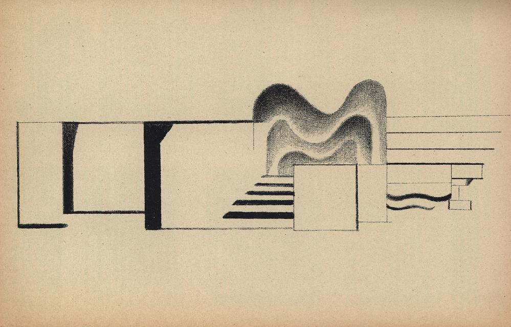 Viking Eggeling. Basse générale de la peinture. Orchestration de la ligne. Lithography. From Dada, Nr. 4/5 (15 May 1919): [p. 23].